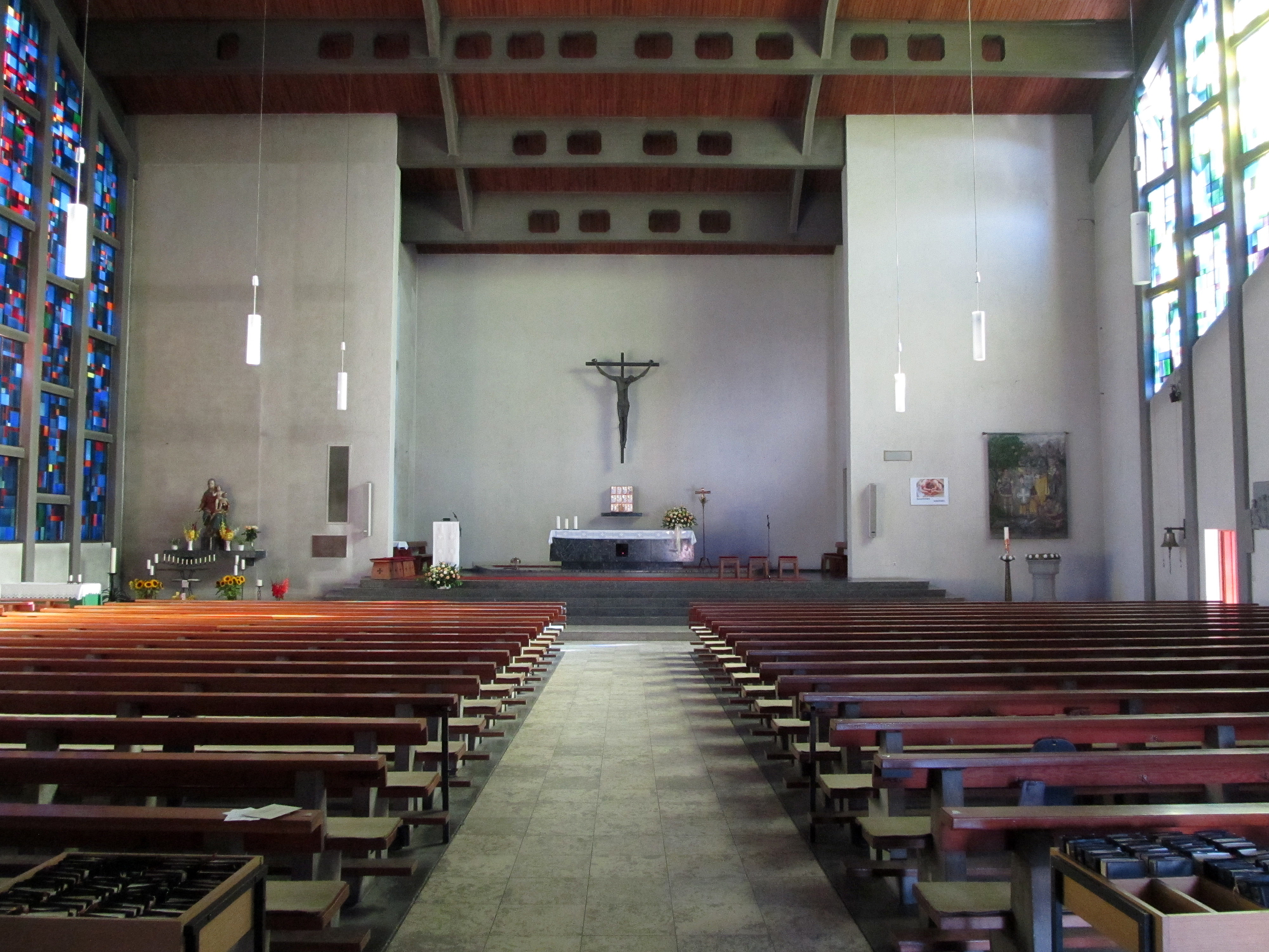 Blick ins Innere der katholischen Pfarrkirche St. Mauritius in Lautzkirchen, Blieskastel, Saarland